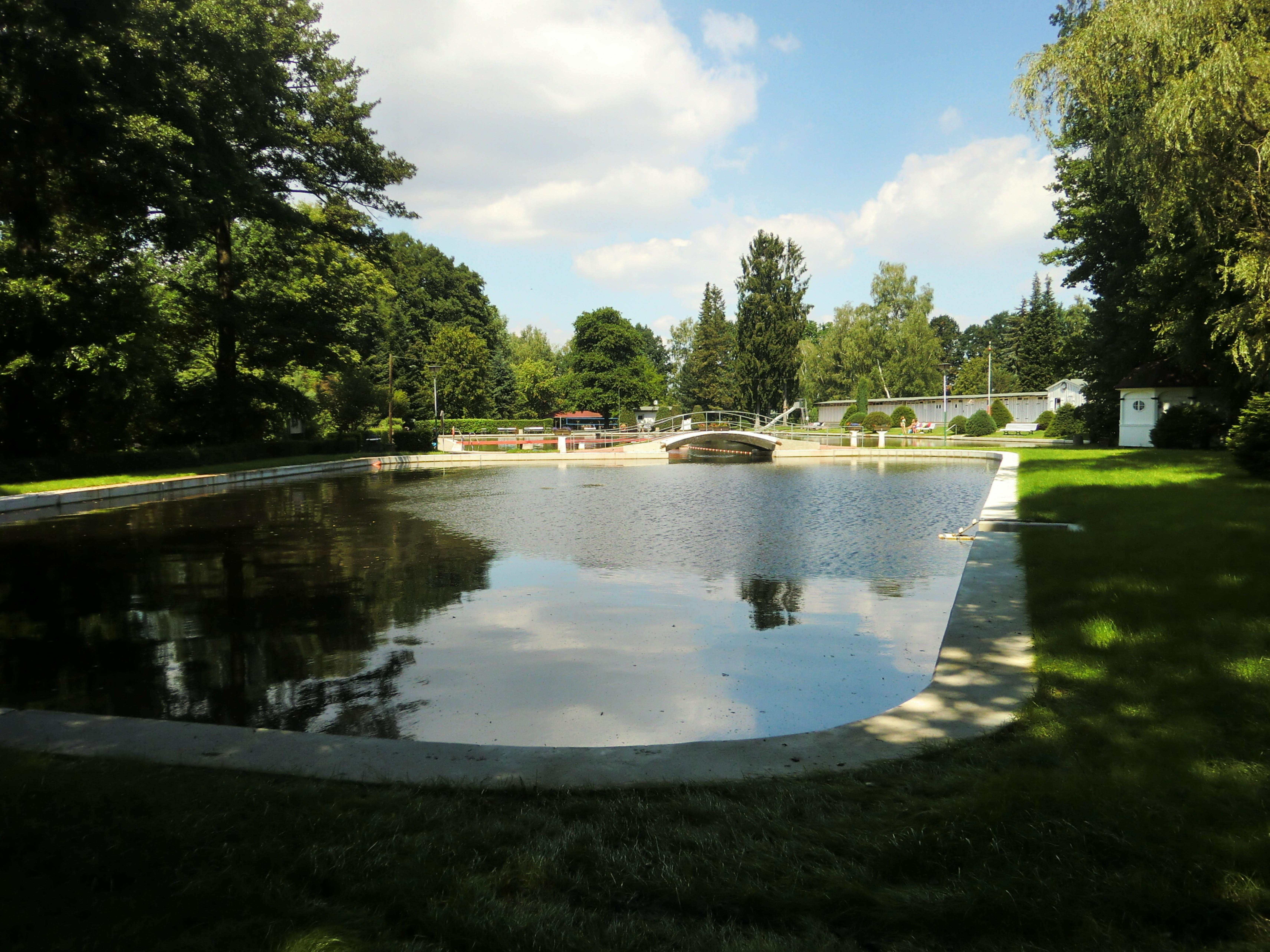 Waldbad Germania Langebrück, Stiehlerstraße 23